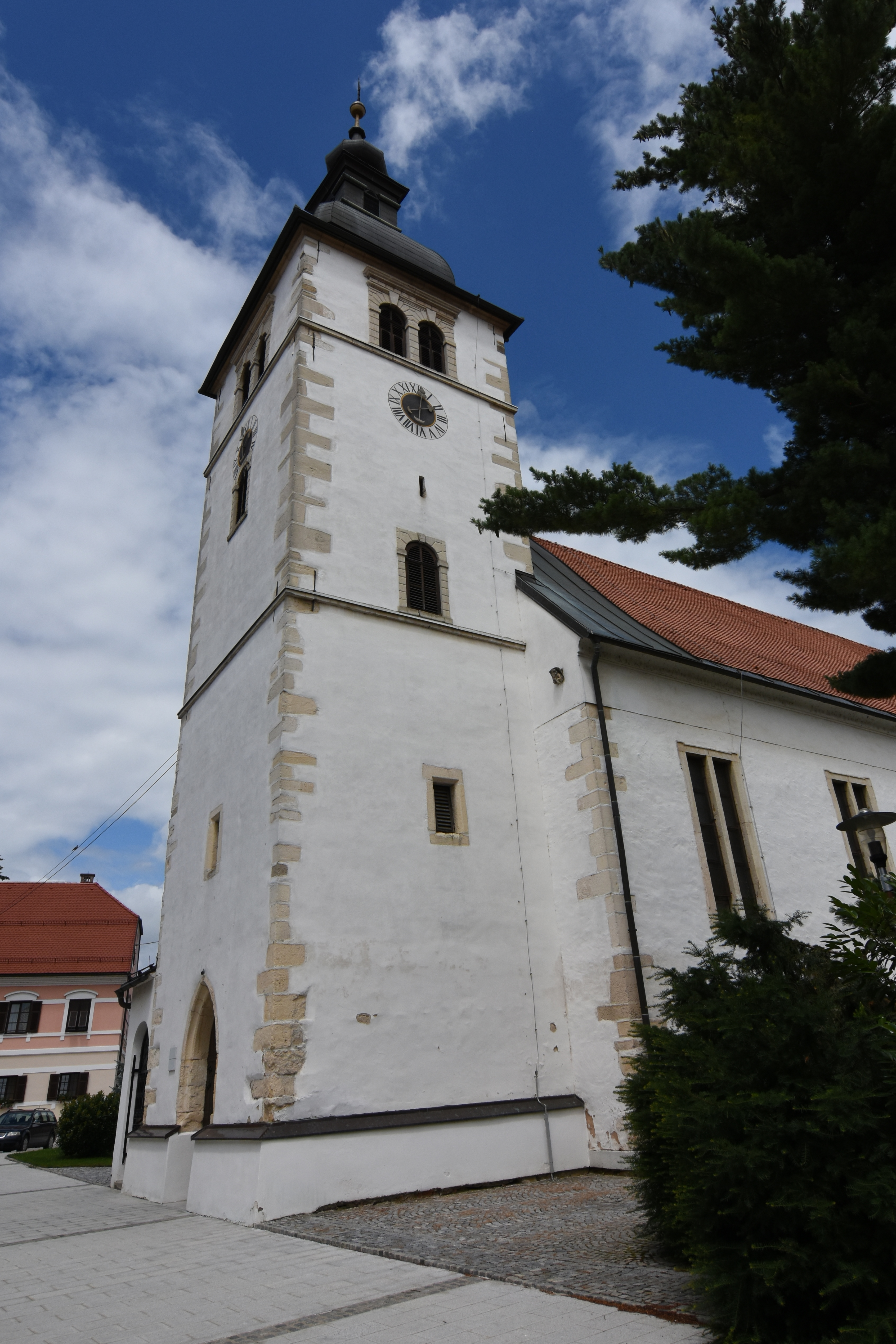 Župnijska cerkev sv. Jakoba Ormož